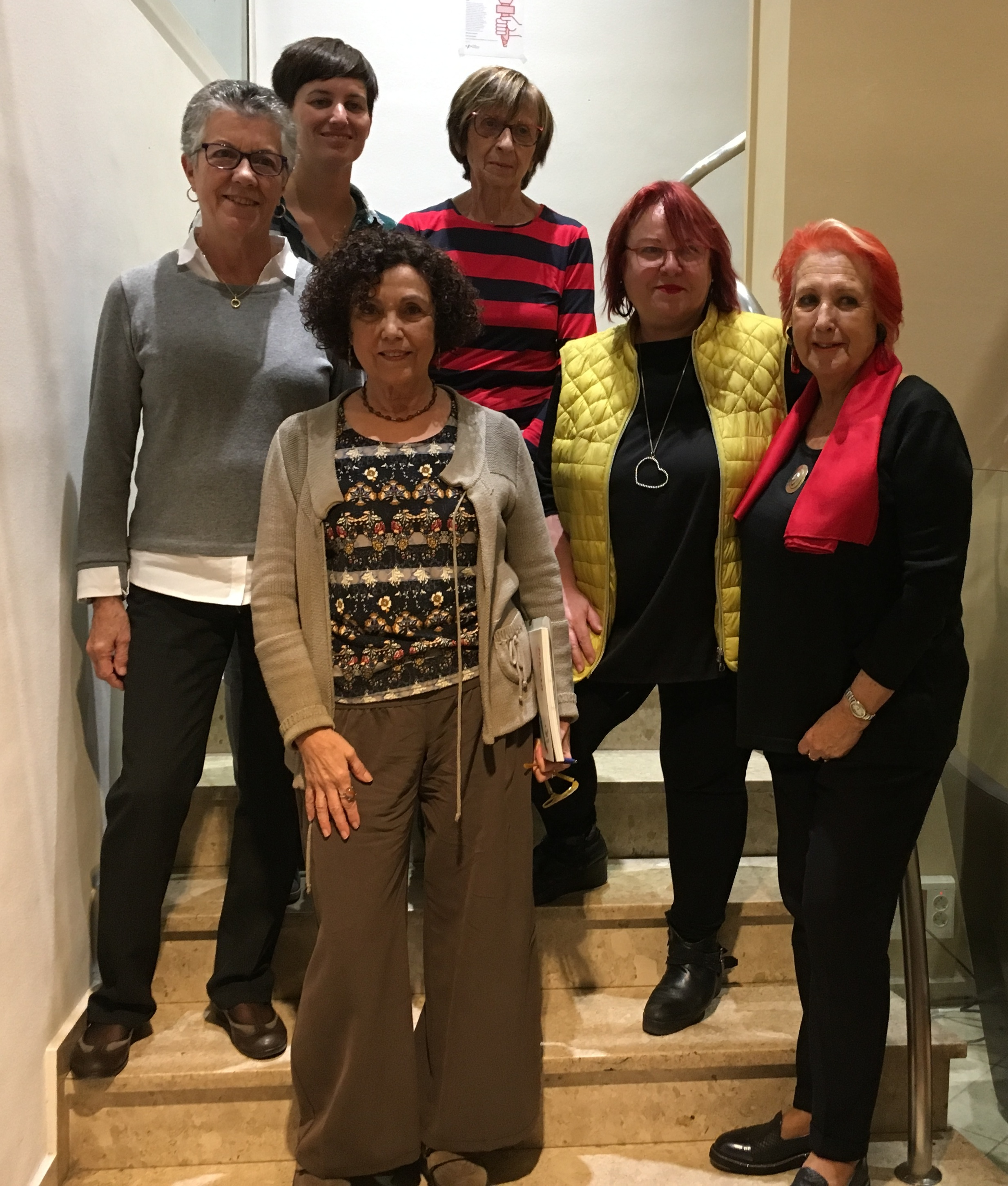 Taula todona en conmemoració dels 25 anys de Dones Periodistes de Catalunya: Montserrat Minobis, Elvira Altés, Rosa María Calaf, Montserrat Boix, June Fernández, María Eugenia Ibáñez